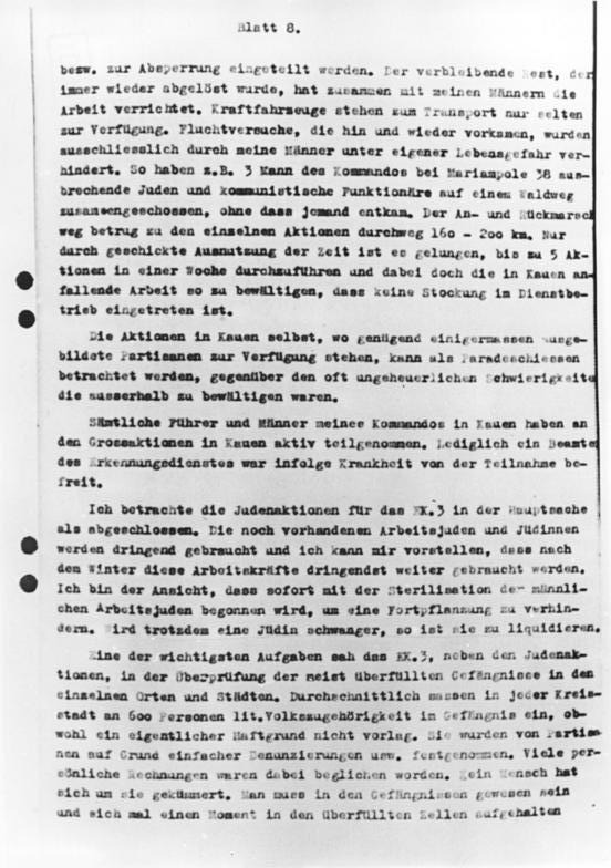 Oberstes Gericht, Globke-Prozess, Beweisstück Zentralbild 16.7.1963 Dokumente über faschistische Greuel aus der UdSSR. UBz: Reproduktion der auszugsweise während des 7. Verhandlungstages des Globke-Prozesses am 15. Juli verlesenen Dokumente über faschistische Greuel in der Sowjetunion. Pedantisch genau zieht hier ein SS-Standartenführer Jäger die grausige Bilanz: "In Litauen gibt es keine Juden mehr." (siehe auch 2 -8 u. 10N)